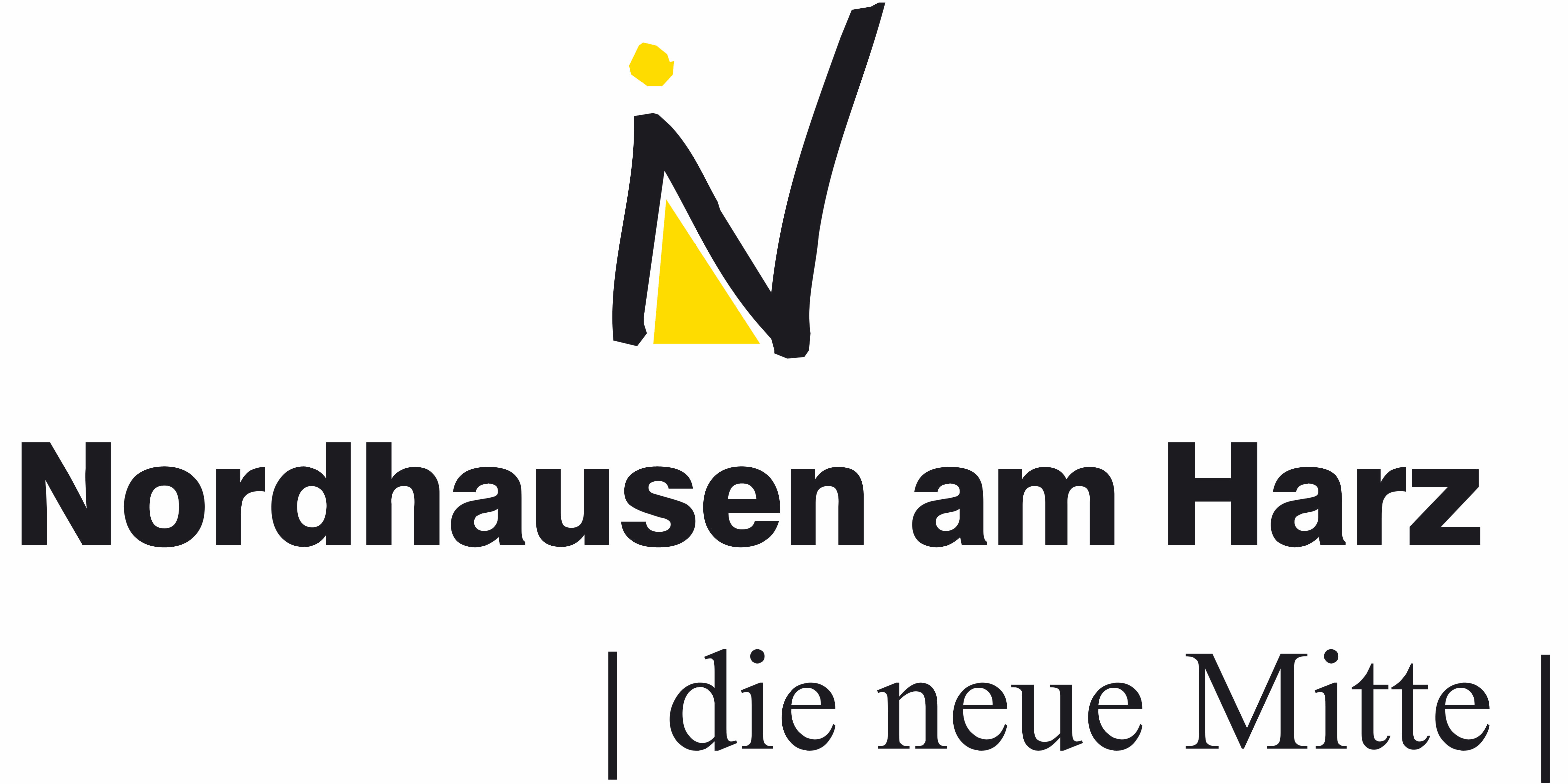 Logo der Stadtverwaltung Nordhausen